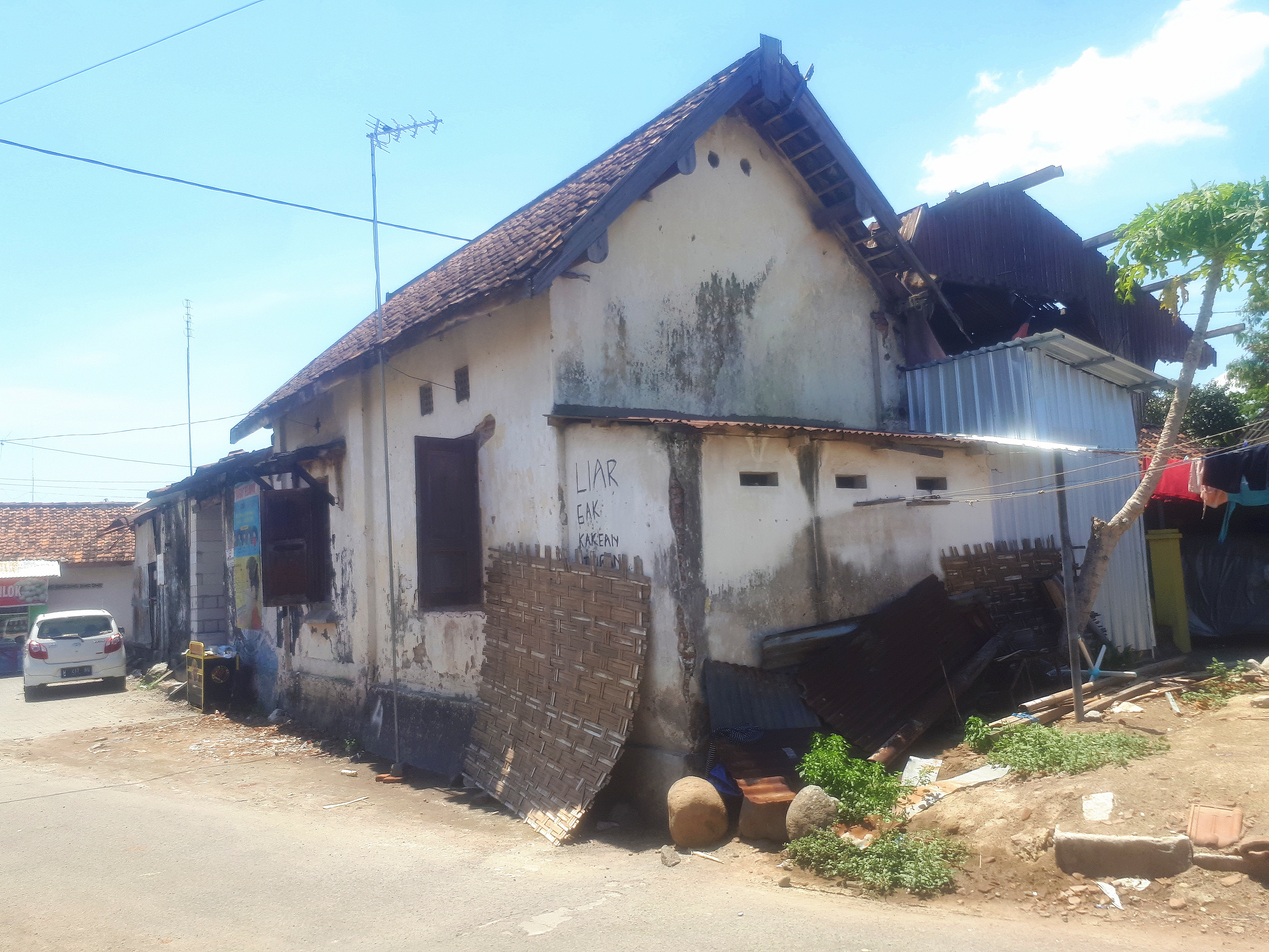 Tampak depan Stasiun Lespadangan yang terletak di Kabupaten Mojokerto. Kini digunakan sebagai hunian warga sekitar, 2020